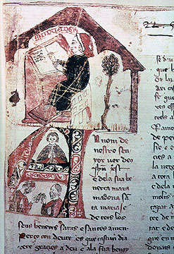 Crónica de Ramón Muntaner (1265-1336). Biblioteca del monasterio de El Escorial; COD K-I-6-F 1